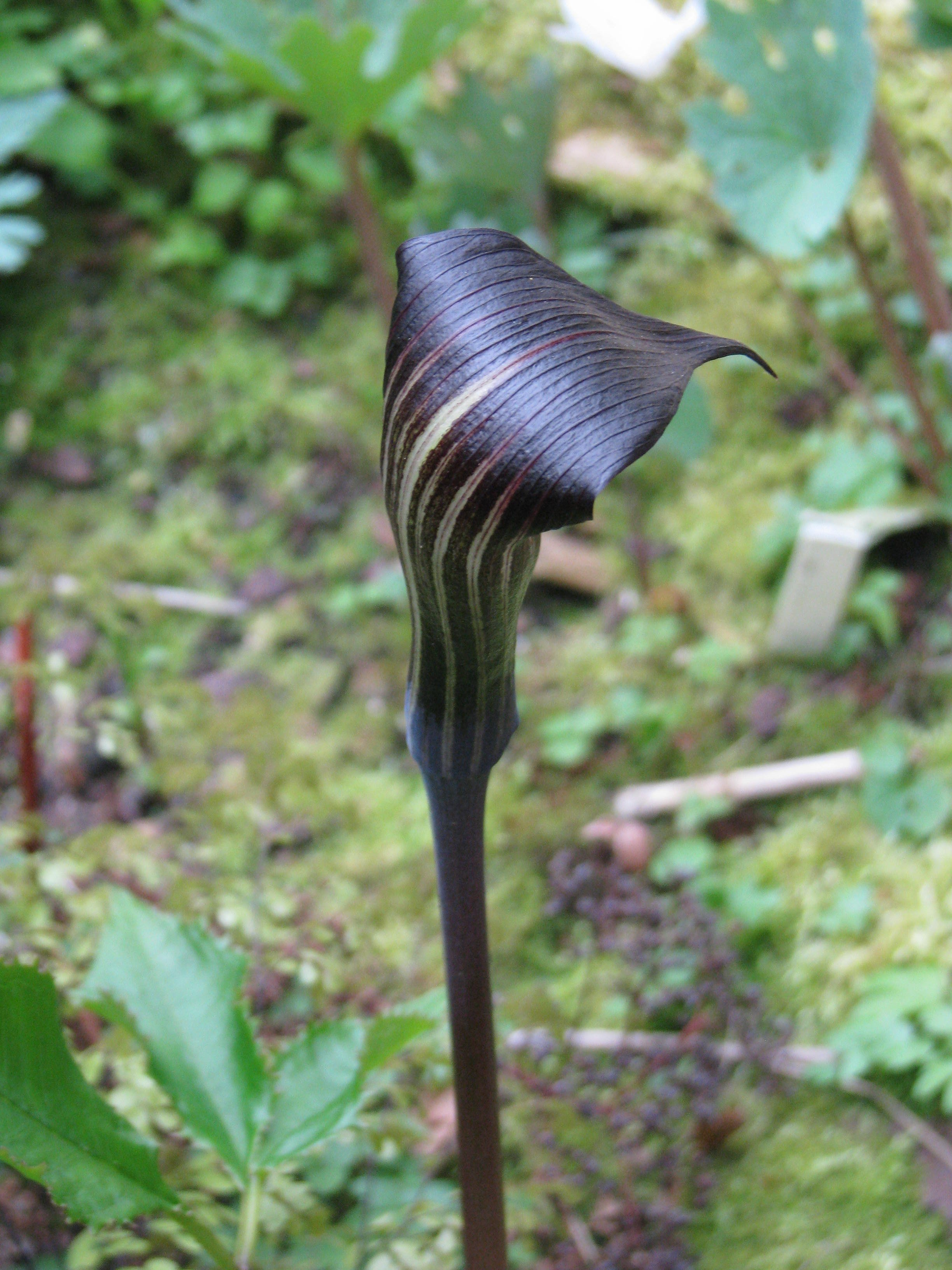 Arisaema engleri